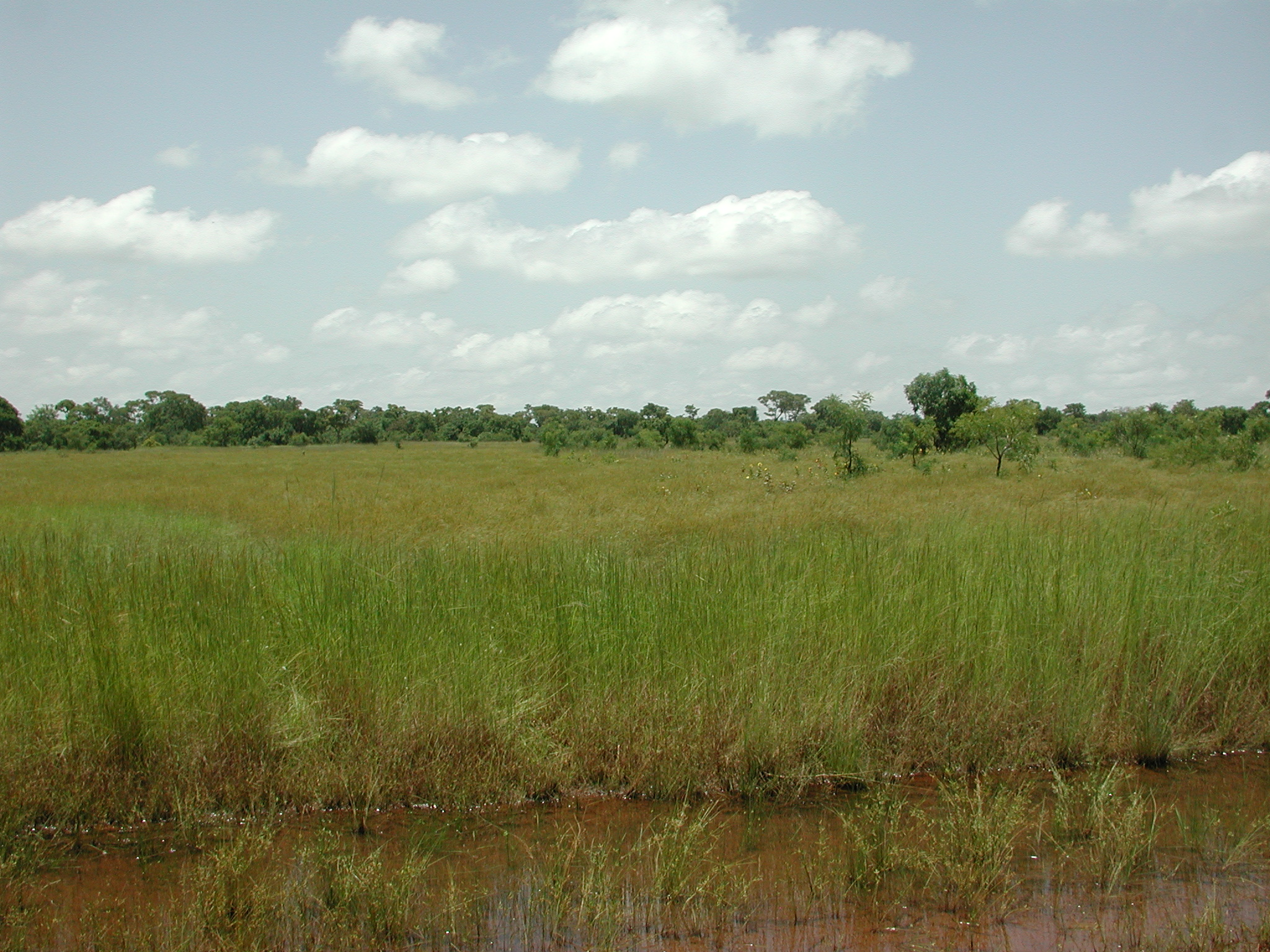 Wet grass savanna, Burkina Faso.